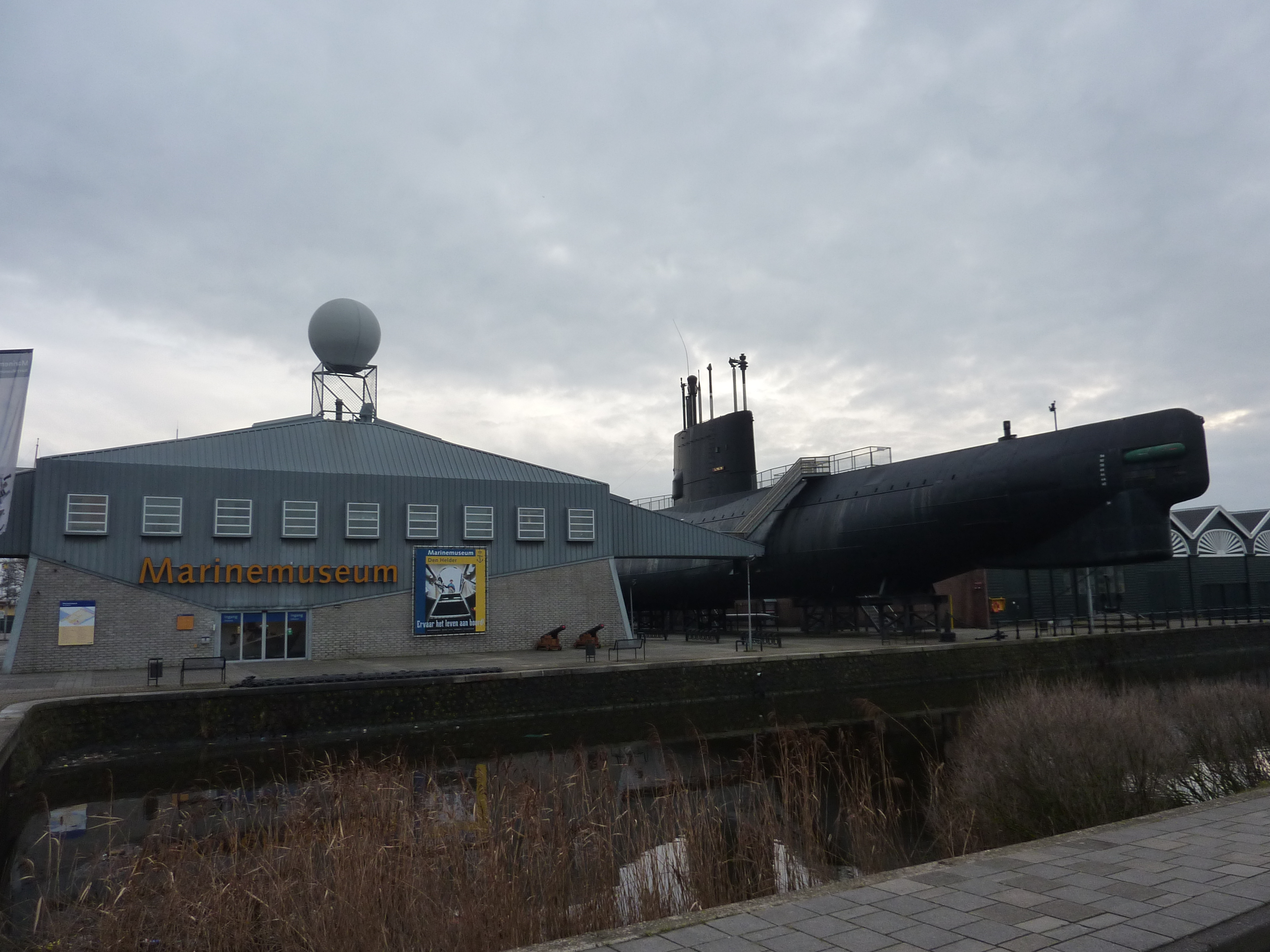 Den Helder